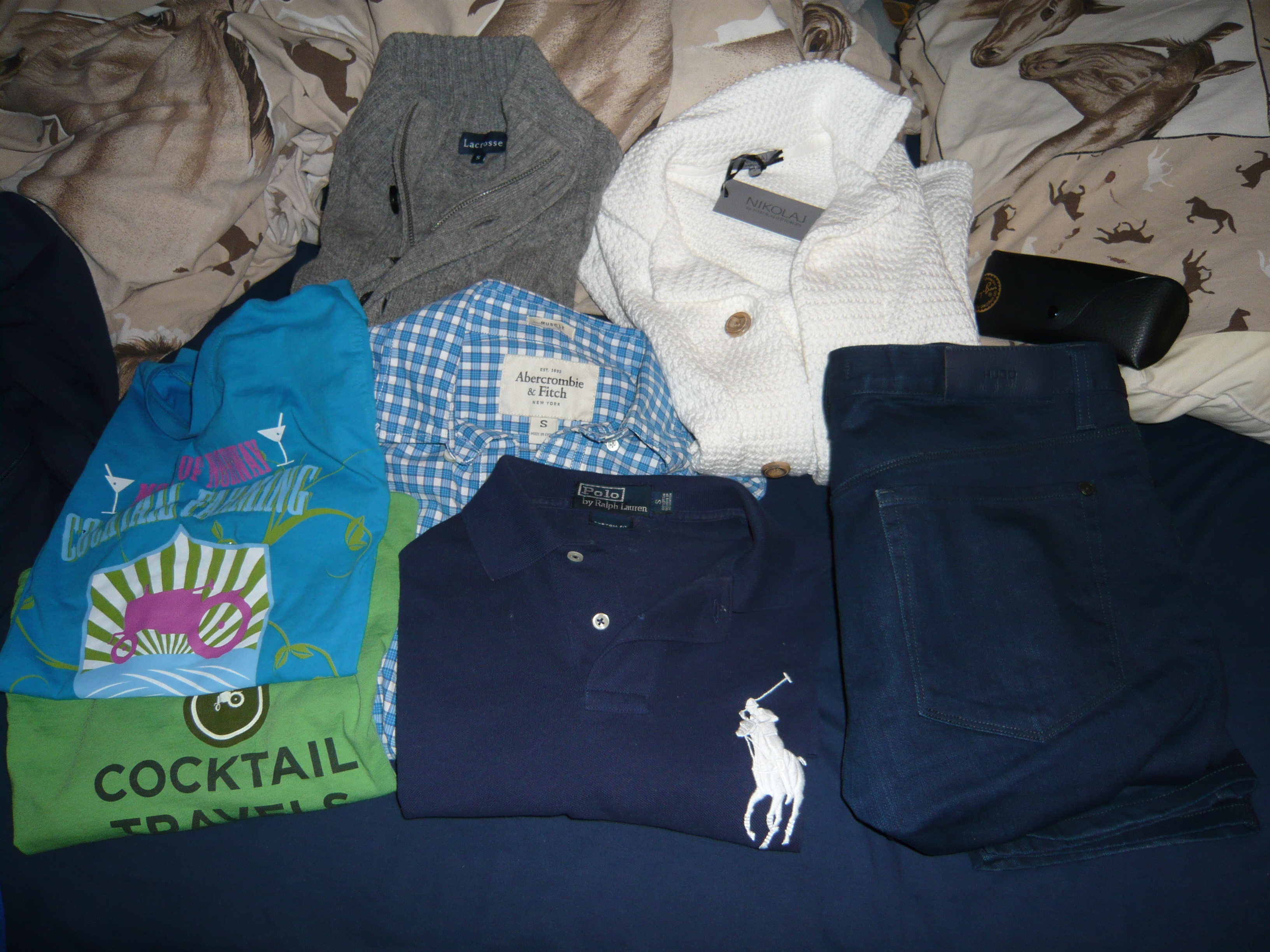 Mineklær, merkeklær. Fra venstre: Puma, Kappa (skjorte), Marwin, Fila (sokker), axe (boxer), Marwin, [Nike (synes ikke)], Blend-bukse med puma-belte, adidas (armgreier) og igjen: Kappa og Marwin.